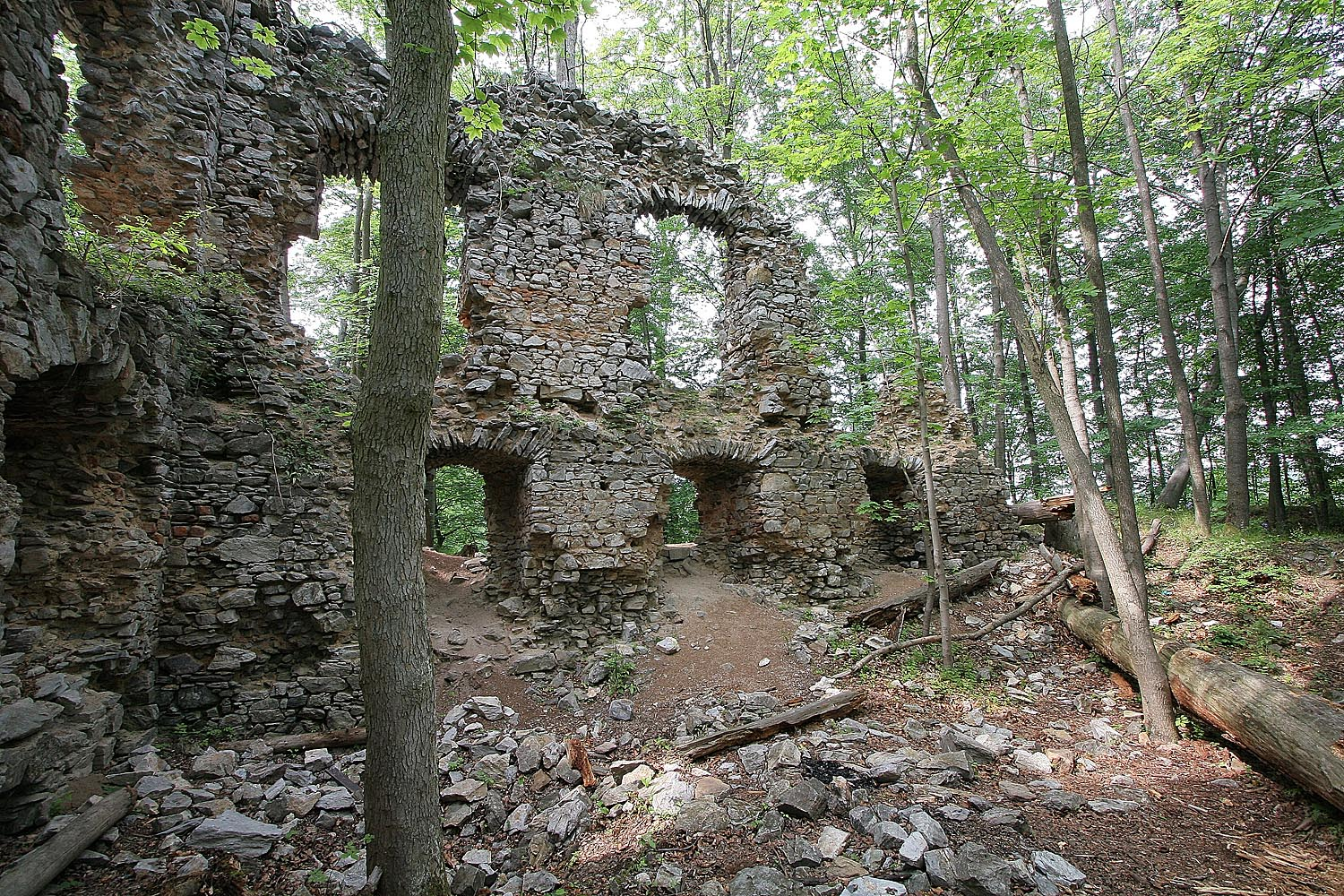 Blansek - zříceniny hradního paláce